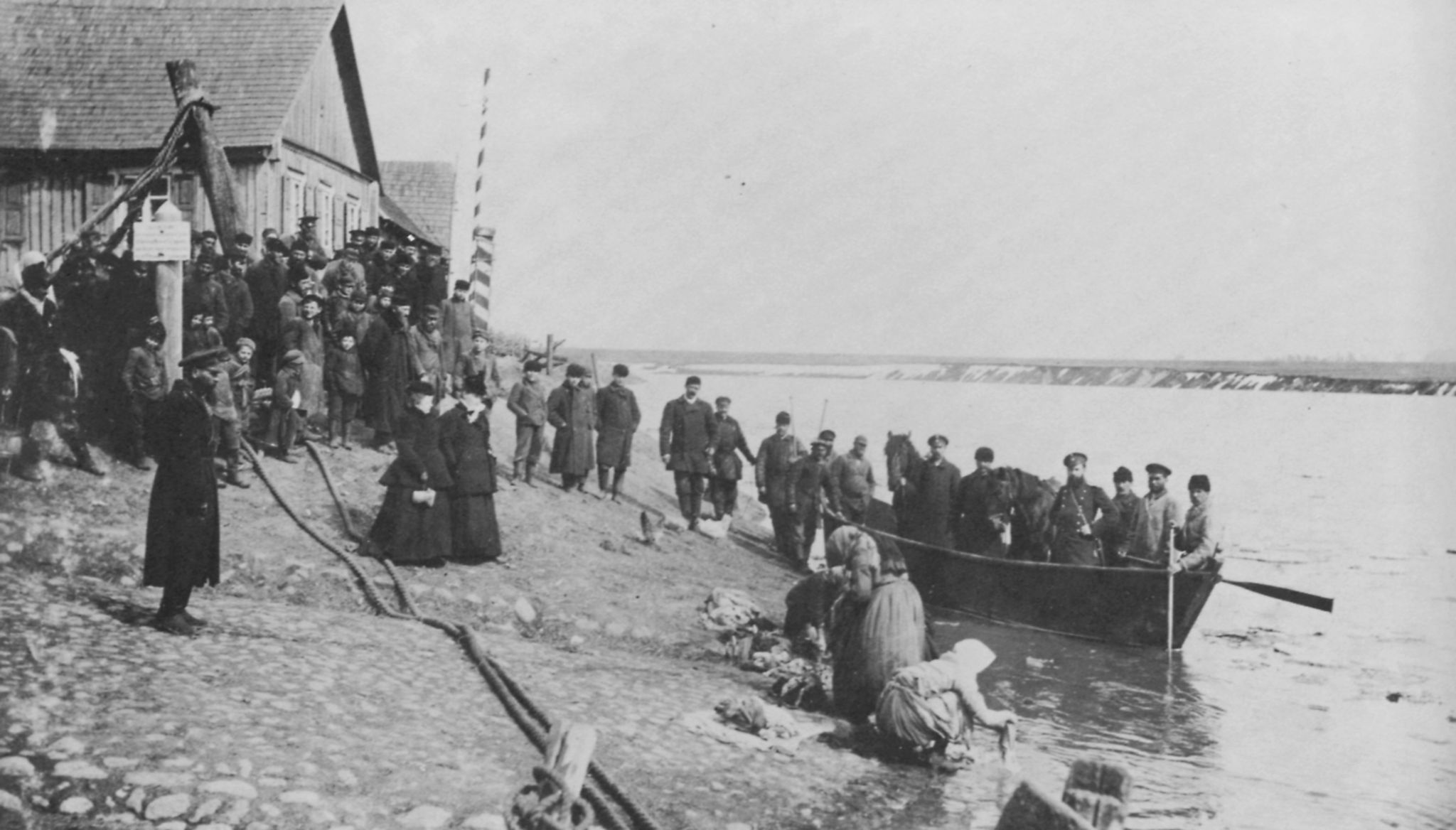 Russischer Photograph: Ankunft im Dorf Janowo im Baltikum